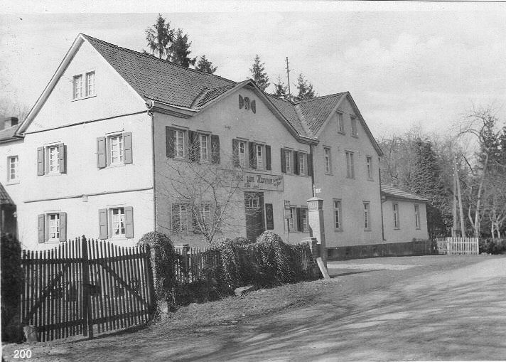 Hammer (Windeck) 1929